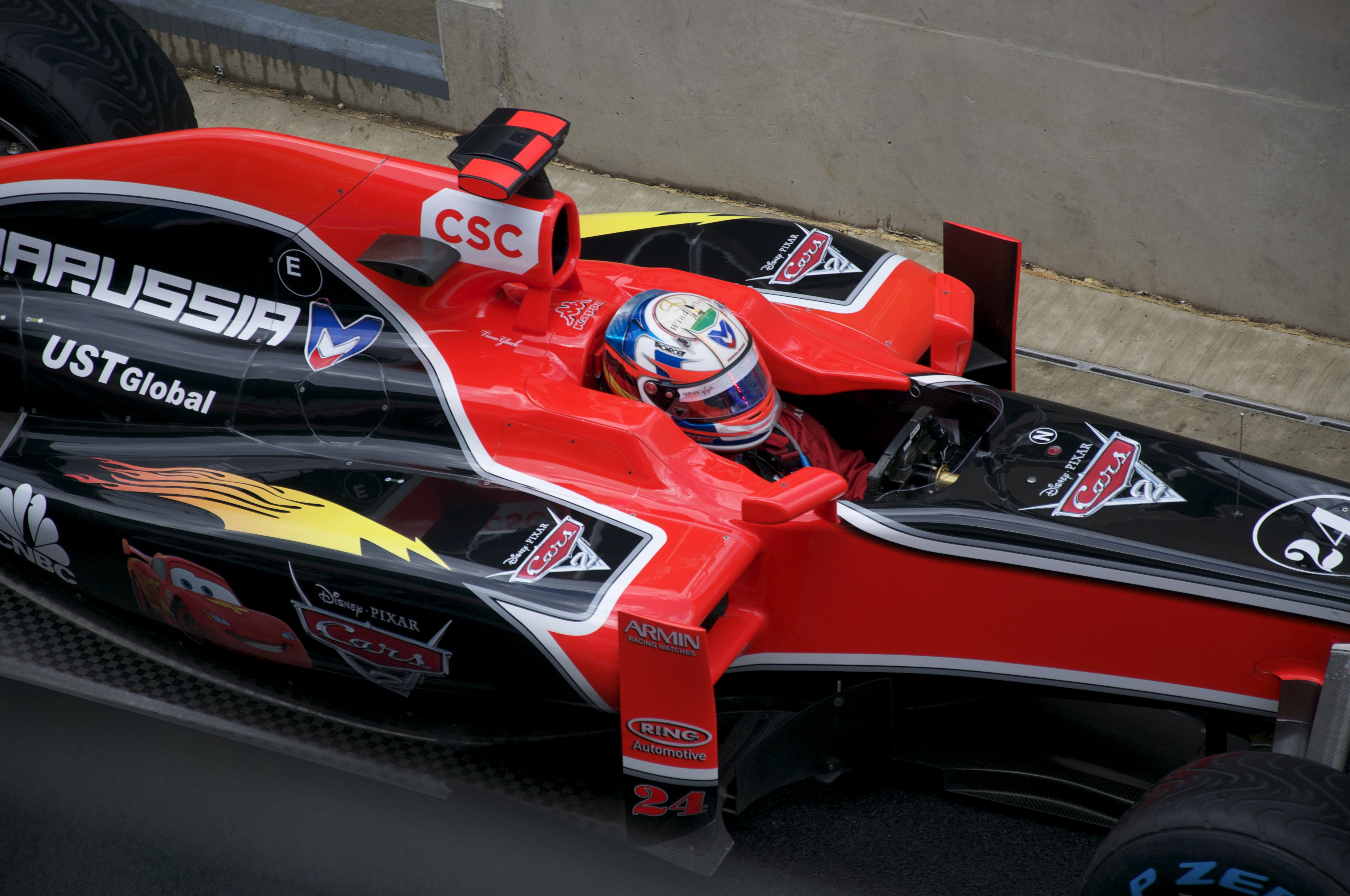 Timo